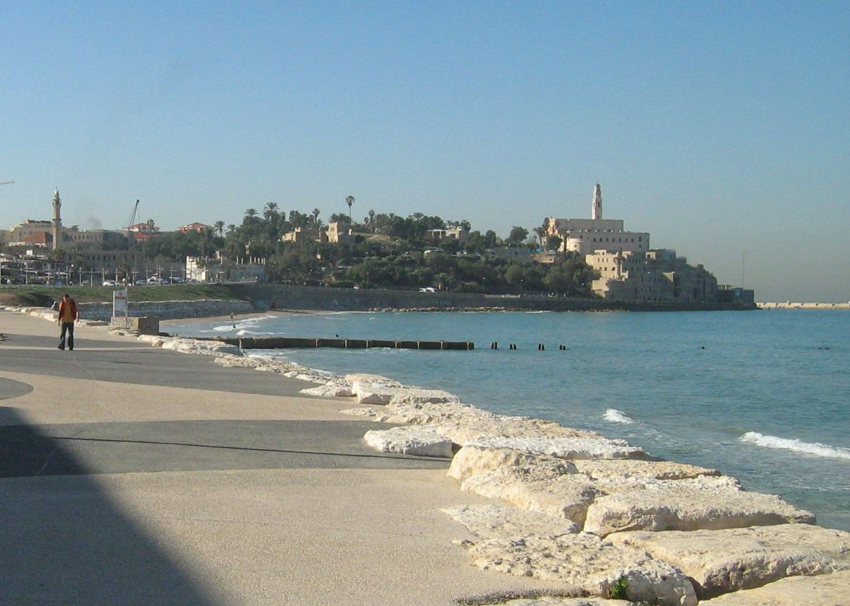 כנסיית פטרוס הקדוש ביפו